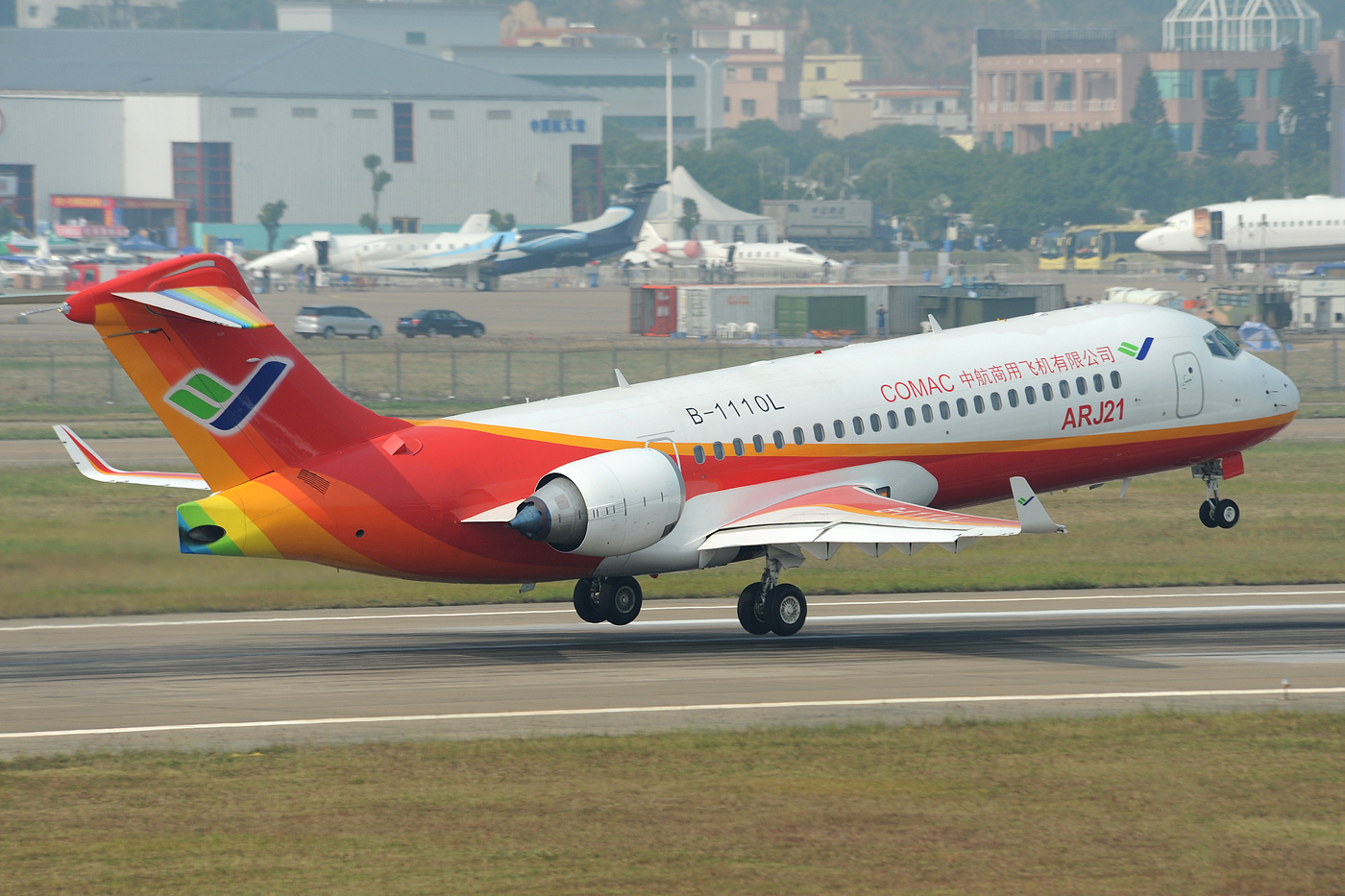 COMAC ARJ-21 (también conocido como ACAC ARJ-21) es un avión de transporte regional chino, inspirado en la familia de reactores McDonnell Douglas MD-90.